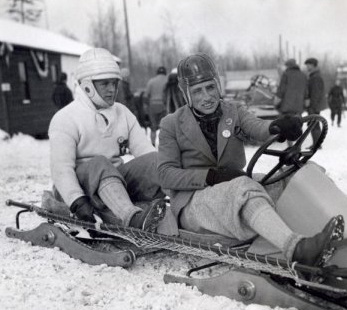 Bobsleeën. Het Belgische bobslee-team 2-mansbob, bestaande uit Max Houben de stuurman en de Zwitser Eisenhut als de reserve-remmer, trainen op de bobsleebaan van Lake Placid voor de komende Olympische Spelen, Lake Placid, Verenigde Staten van Amerika februari 1932.